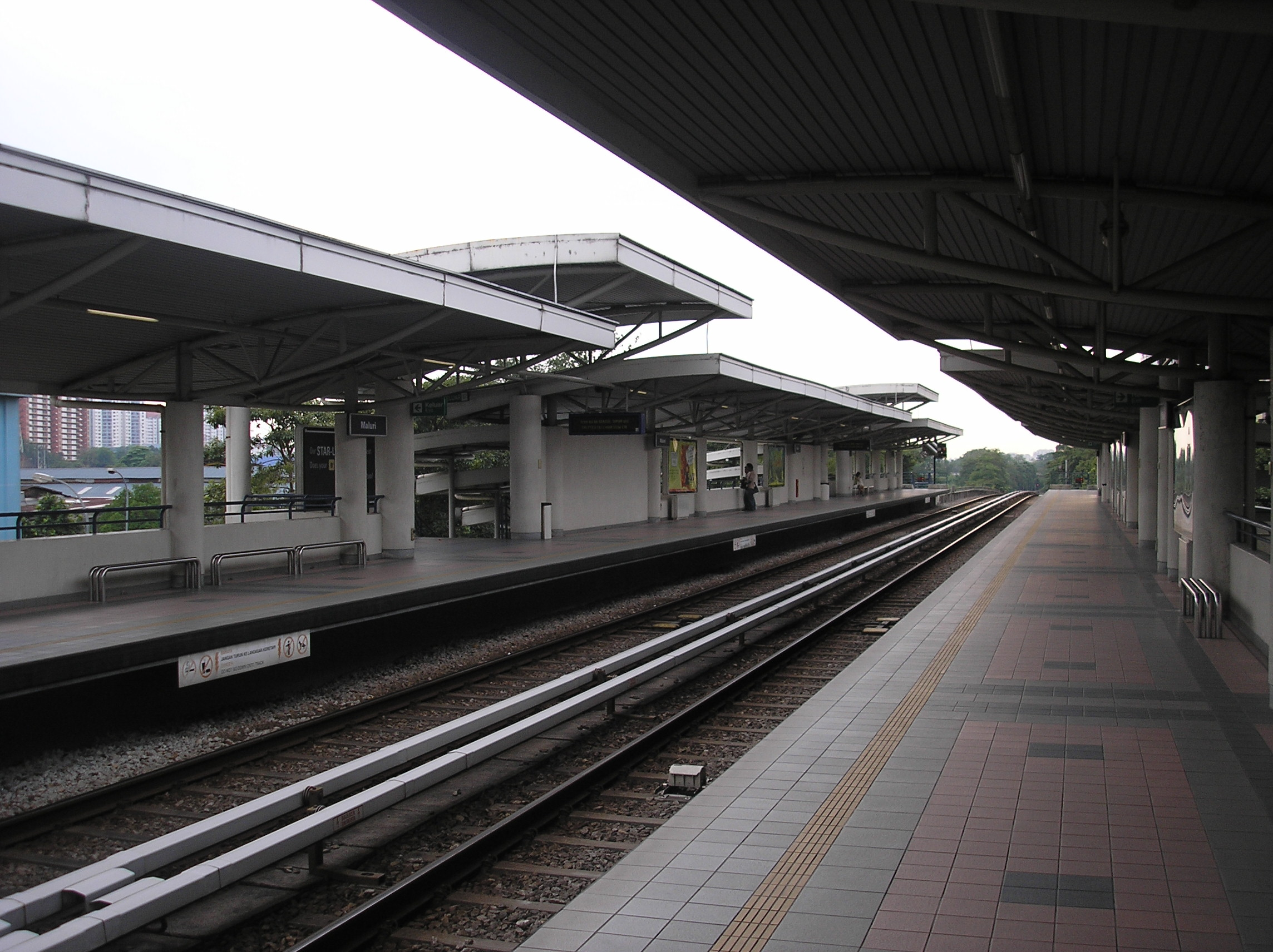 The Maluri LRT station (Ampang Line), Kuala Lumpur, Malaysia.